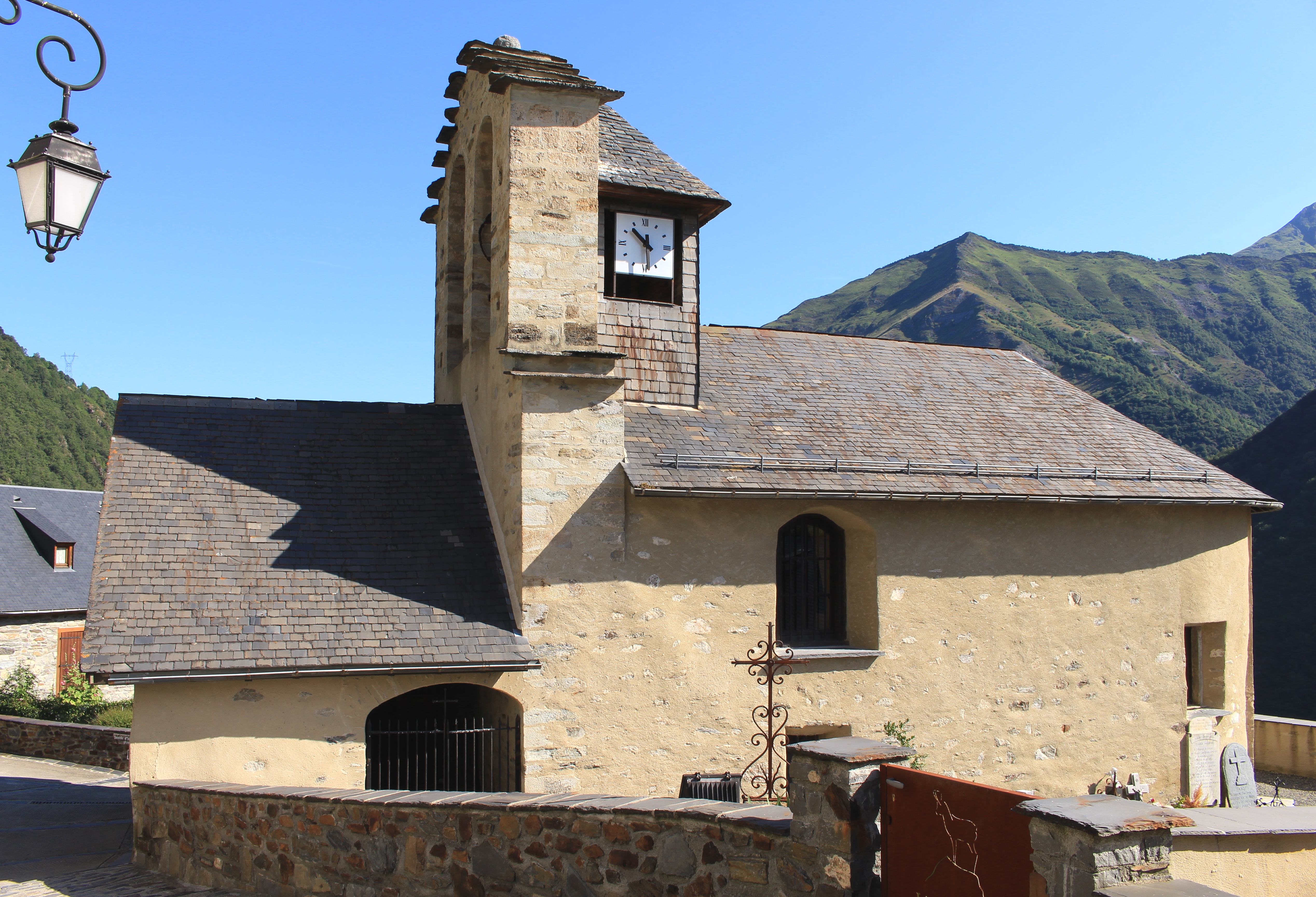 Église Saint-Pierre de Viscos (Hautes-Pyrénées)